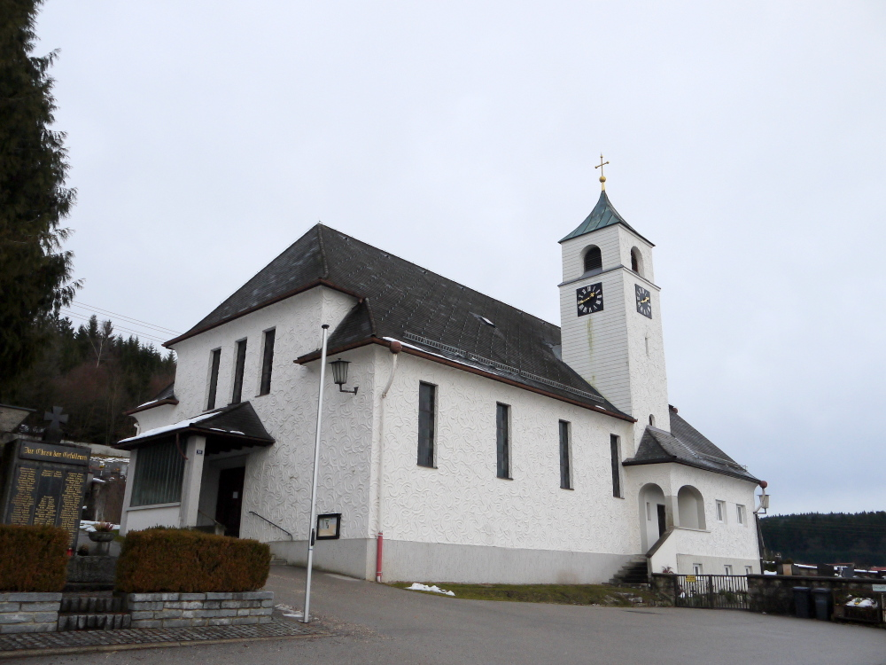 Kath. Pfarrkirche Maria Lourdes und Kriegerdenkmal